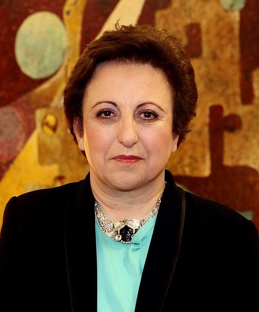 Shirin Ebadi no Fronteiras do Pensamento São Paulo 2011 (Sala São Paulo)